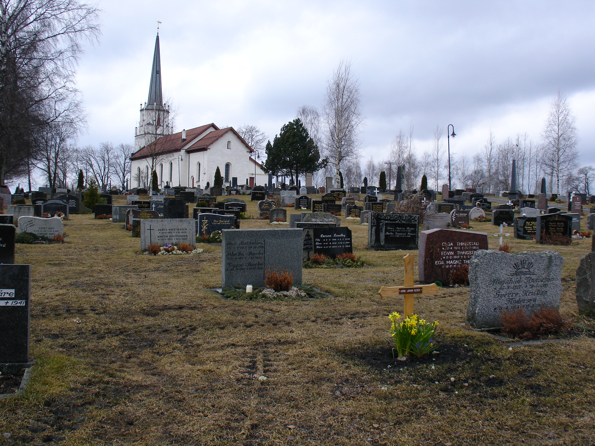 Løiten ( Løten) kyrka